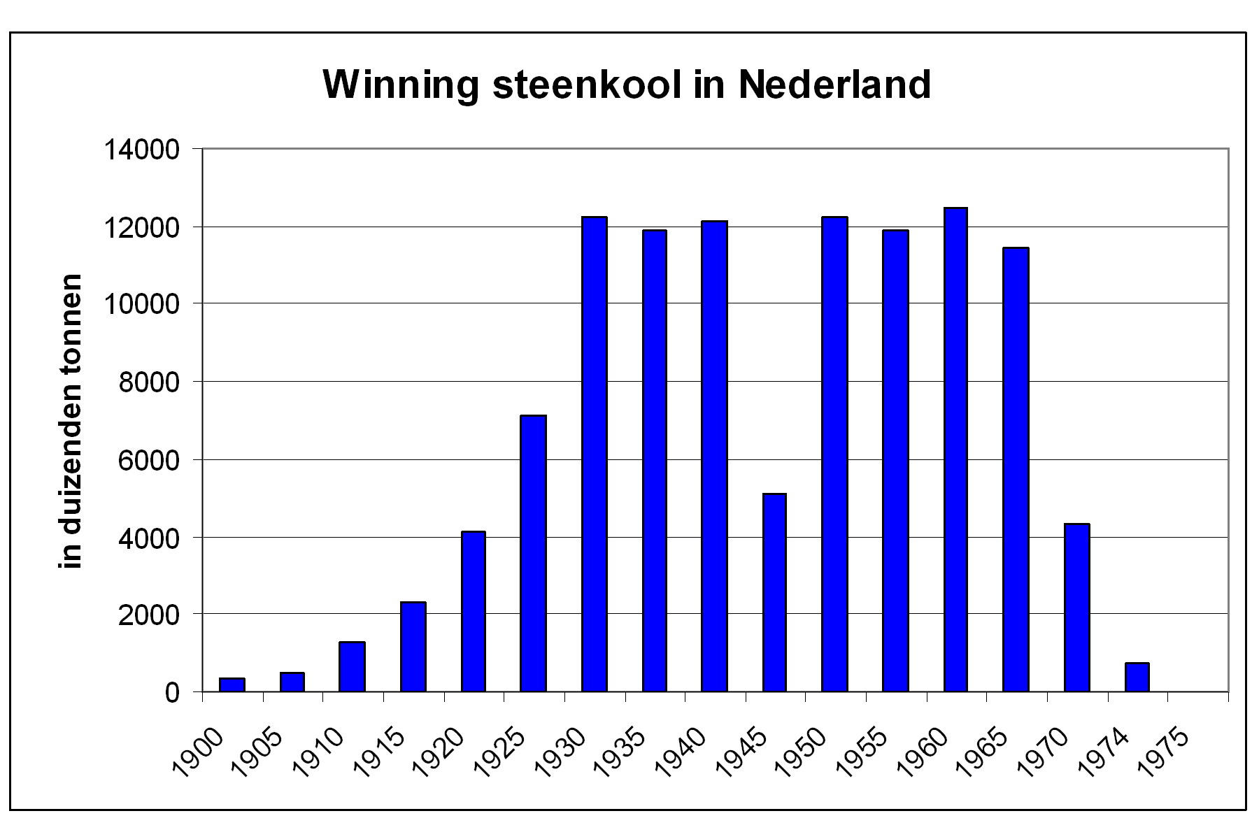 Overzicht winning van steenkool in Nederland tussen 1900-1975 (gemeten in duizenden tonnen). Bron CBS Statline